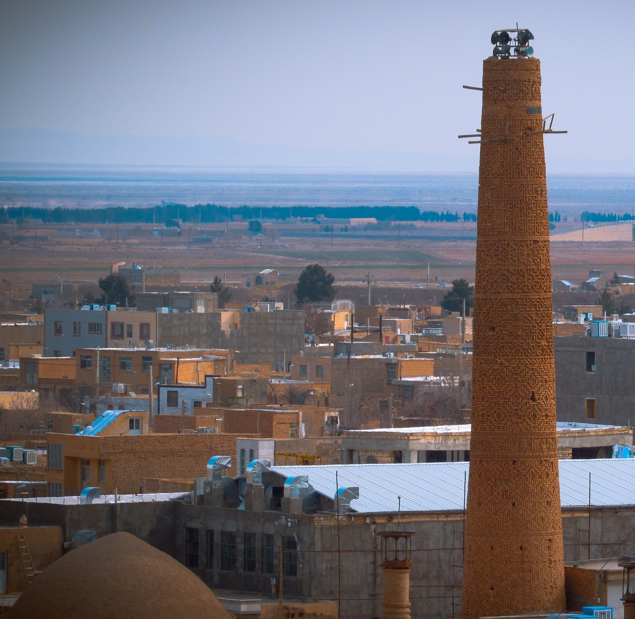 مناره مسجد جامع دامغان،تصویر ثبت شده از ارتفاع. عکس: امیرحسین فراتی